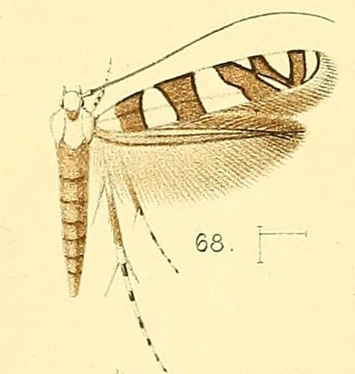 Acrocercops bifasciata